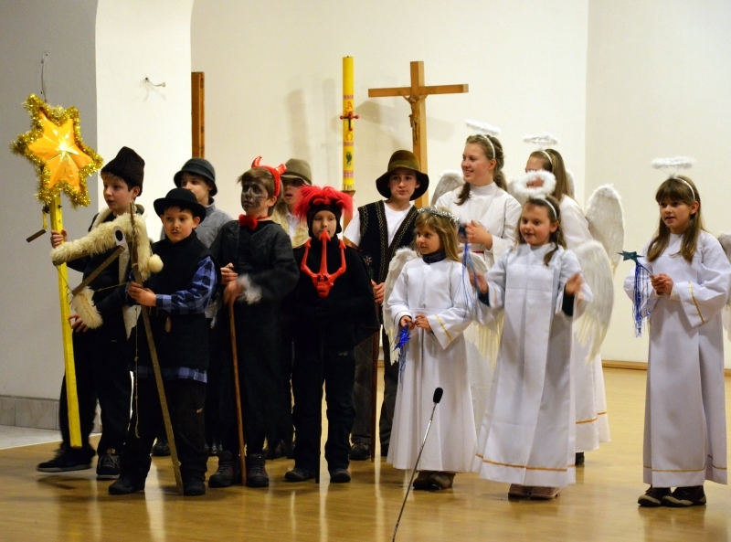 Feste der Heiligen drei Könige in Sanok